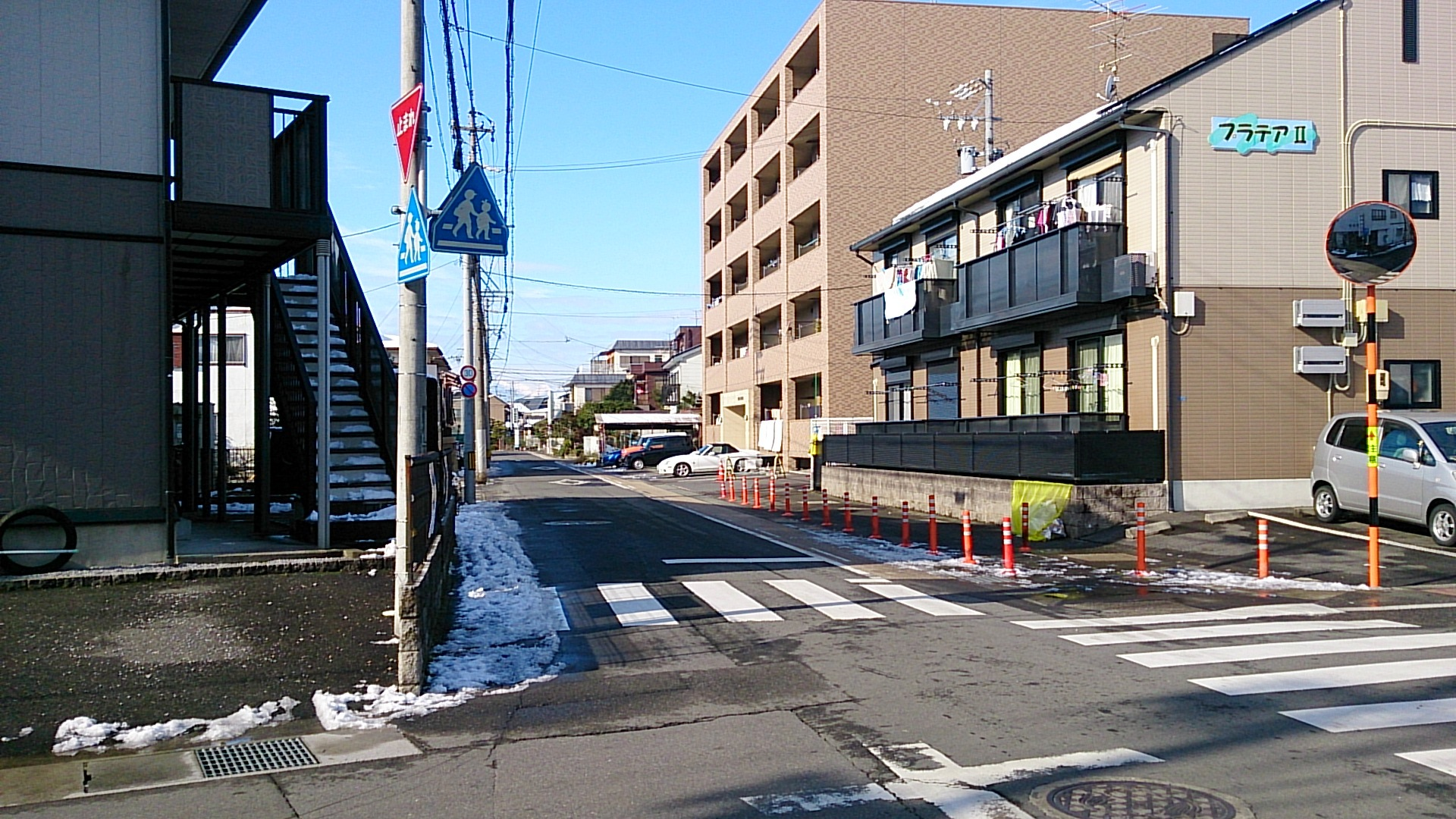 一時期は「弘法東口」駅とも呼ばれていた。 不自然な道幅が跡地を物語っている。 撮影地点では薬局・岐阜市立精華中学校が付近にある。